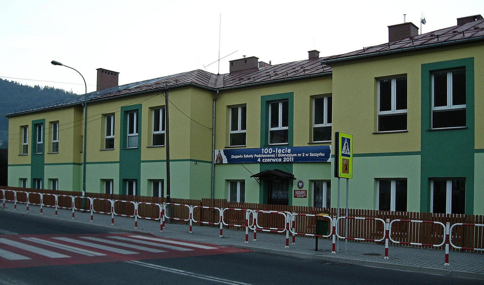 Szkoła Podstawowa i Gimnazjum nr 2 w Szczyrku